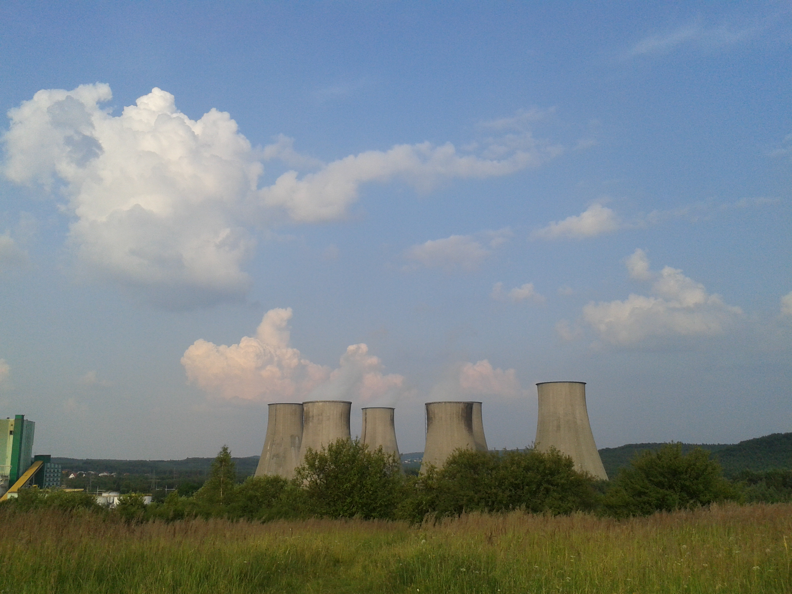 Elektrownia Siersza